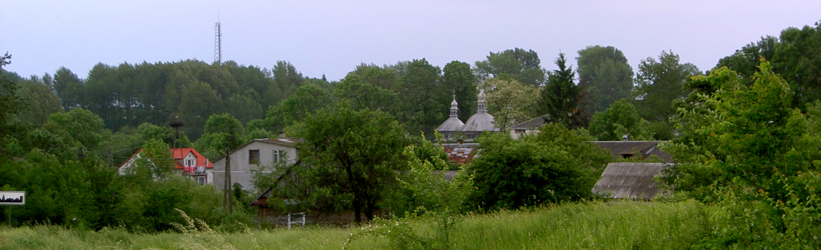 Chłopiatyn, Poland • Panorama